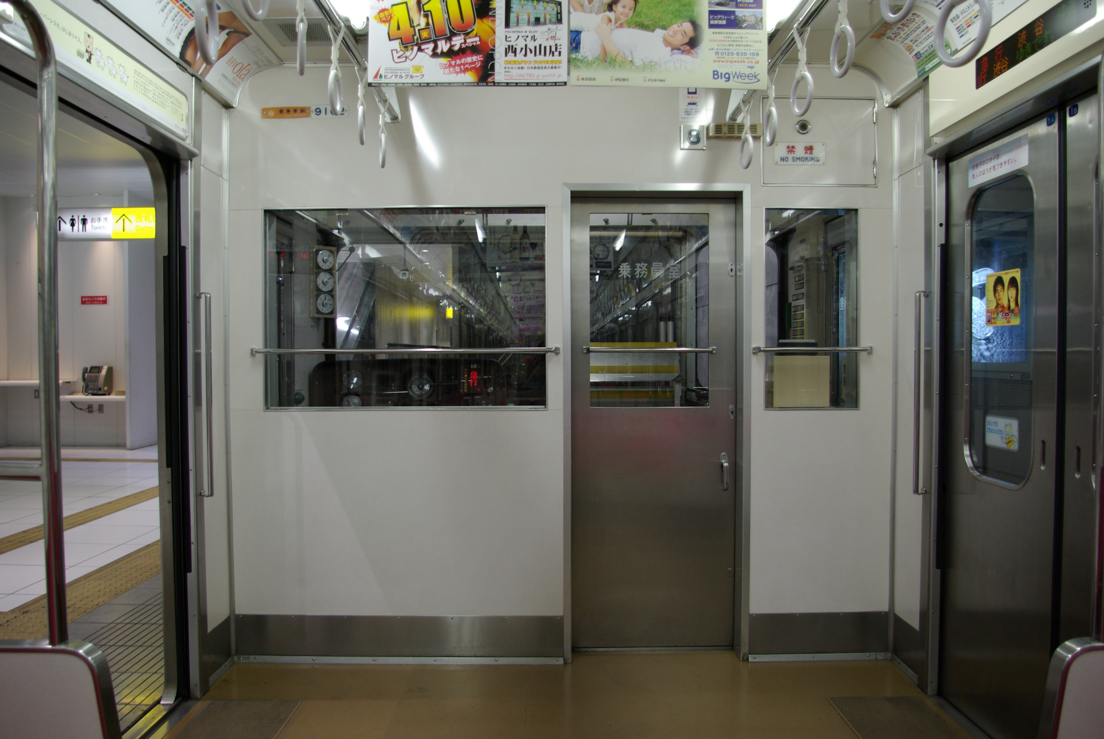 東急9000系9102号